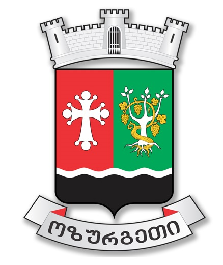 ოზურგეთის მუნიციპალიტეტის გერბი